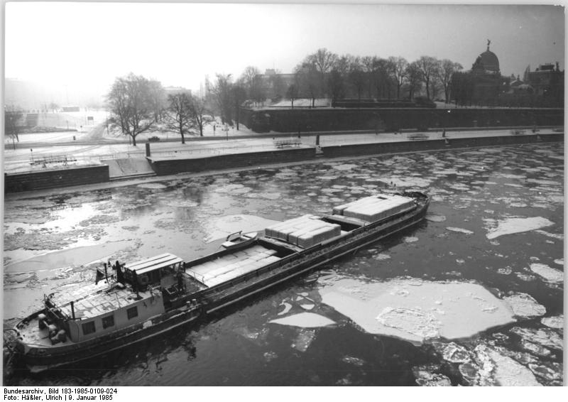 Dresden, Elbe, Lastkahn, Winter ADN-ZB Häßler 9.1,85-ub-Dresden: Wetter - Dichtes Treibeis führt die Elbe bei Dresden. Mit einem Zufrieren des Stromes muß gerechnet werden. Noch auf Fahrt befindliche Schiffe laufen Häfen an. Zuletzt war die Elbe 1963 vereist.